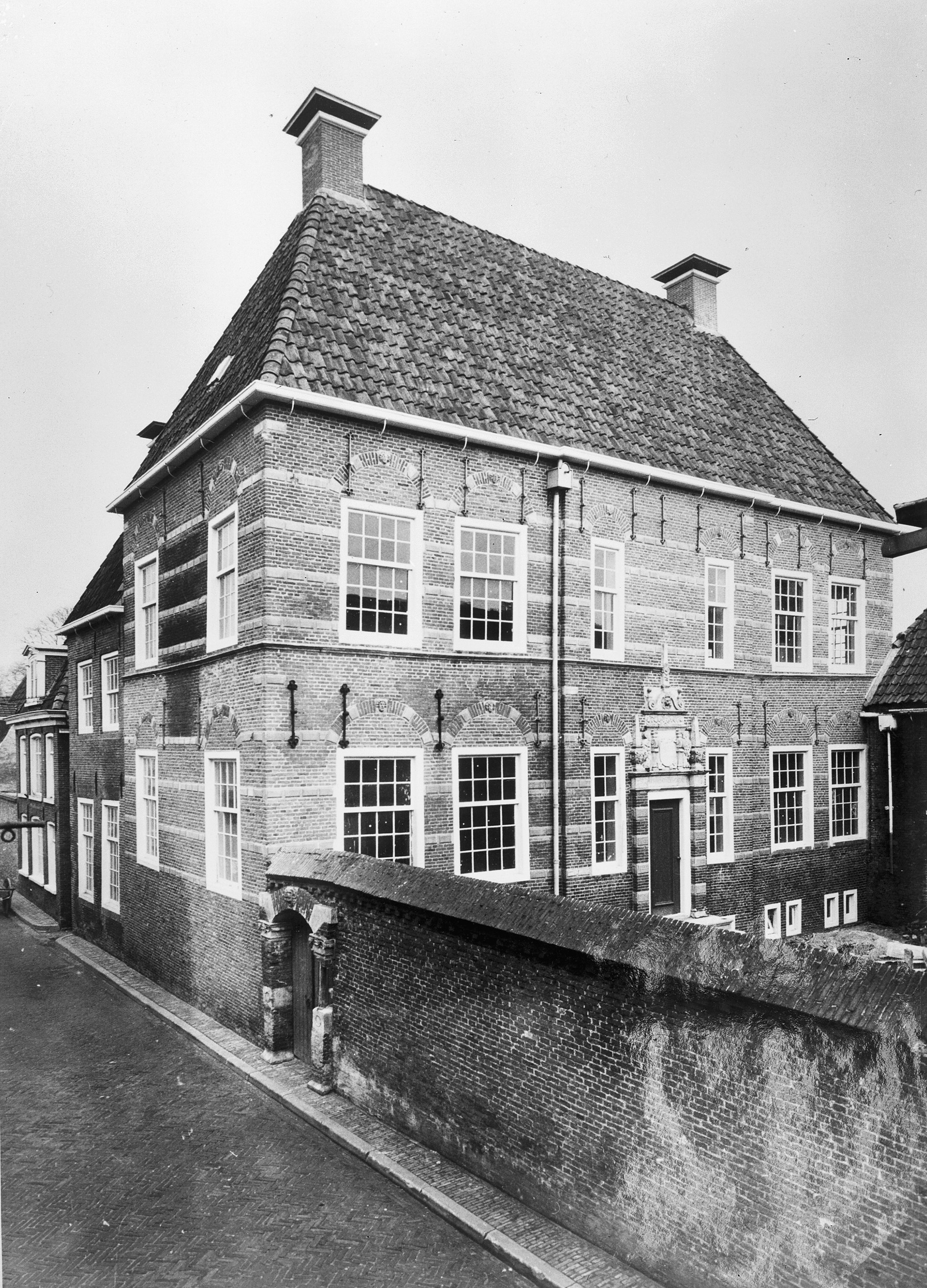 Admiraliteitsgebouw: exterieur